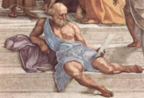 Diogene